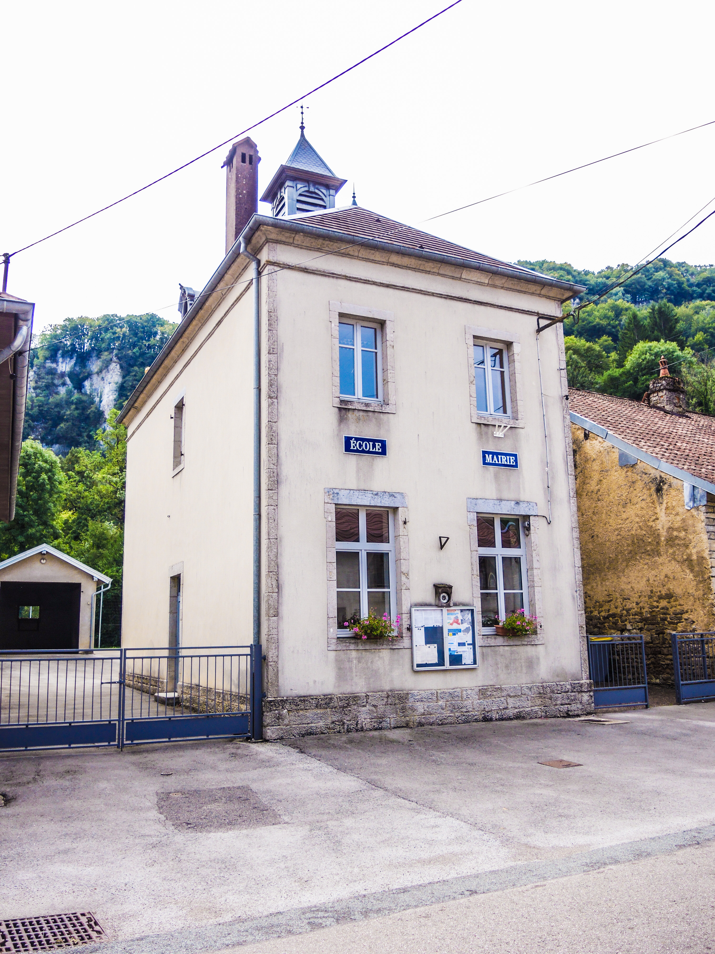 Mairie de Guillon-les-Bains. Doubs